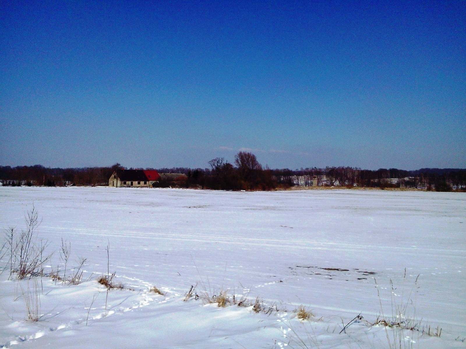 Widok na Borkowo Małe